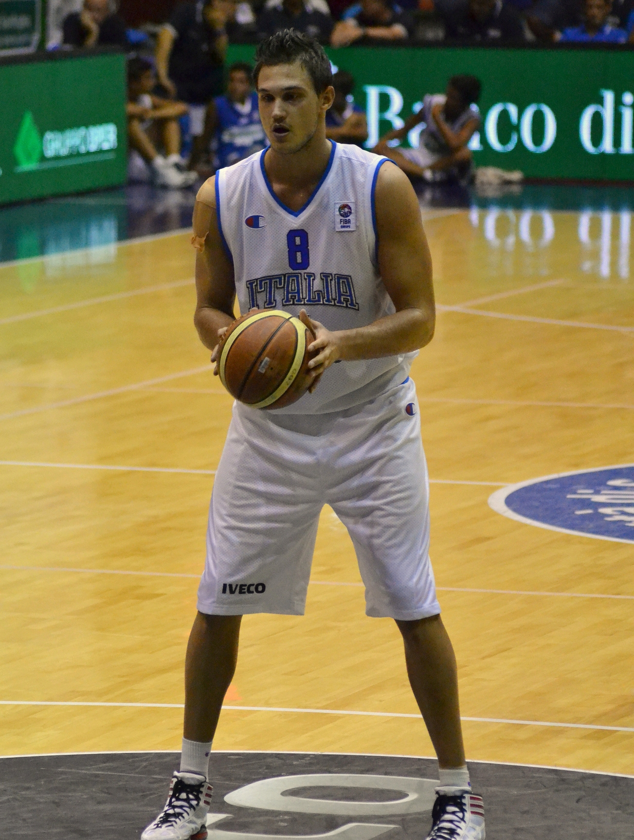 Qualificazioni Europei di basket - Danilo Gallinari